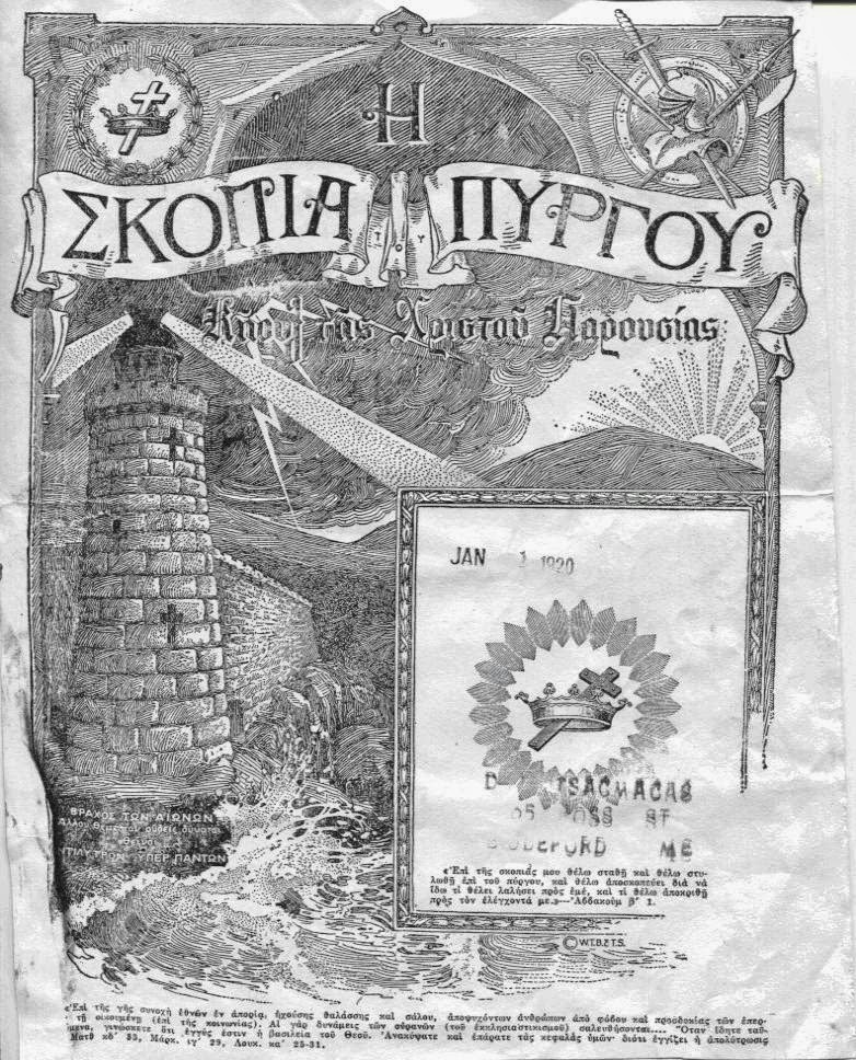 Strażnica w języku greckim wydanie amerykańskie (1 stycznia 1920, rok VI)